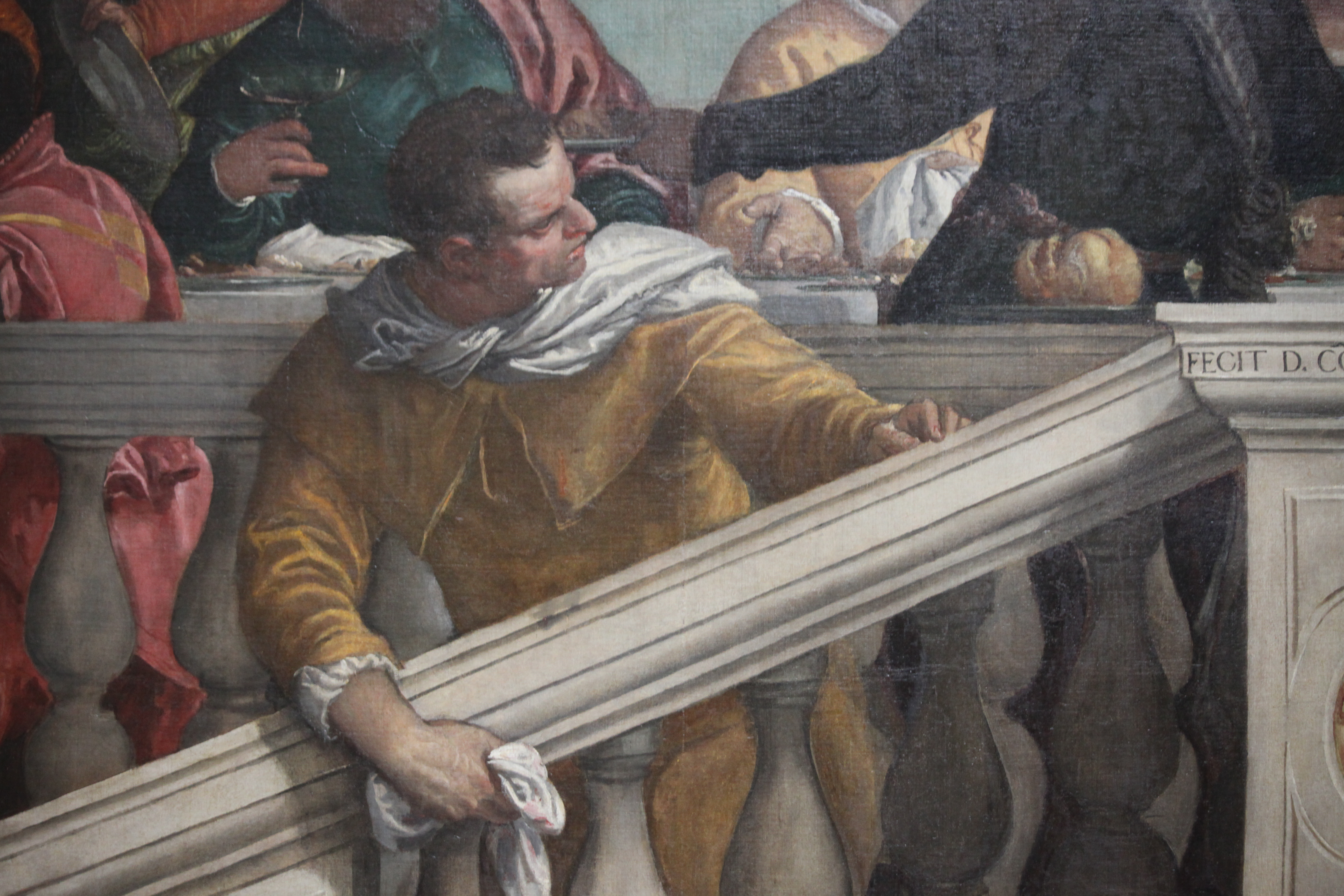 Gallerie dell'Accademia - MIBAC This is a photo of a monument which is part of cultural heritage of Italy.